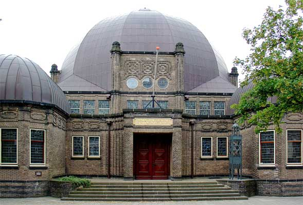 Synagoge van Enschede, ontworpen door de architect Karel de Bazel